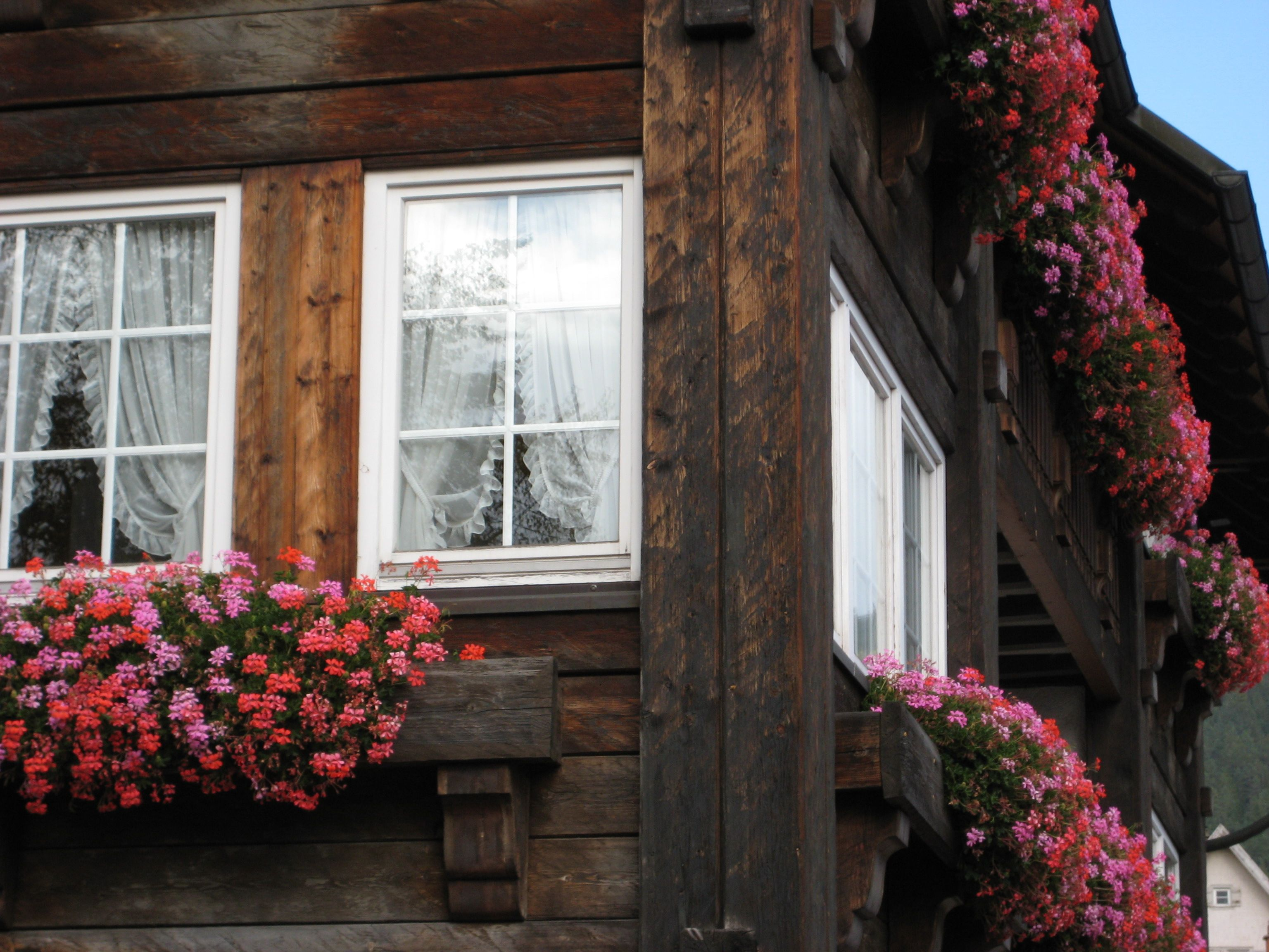 Typescht Haus mat sengen Blummenarrangementer am Schwarzwald